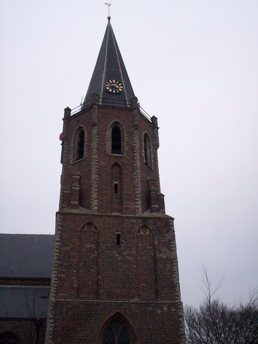 Toren van de oude kerk van Kruiningen